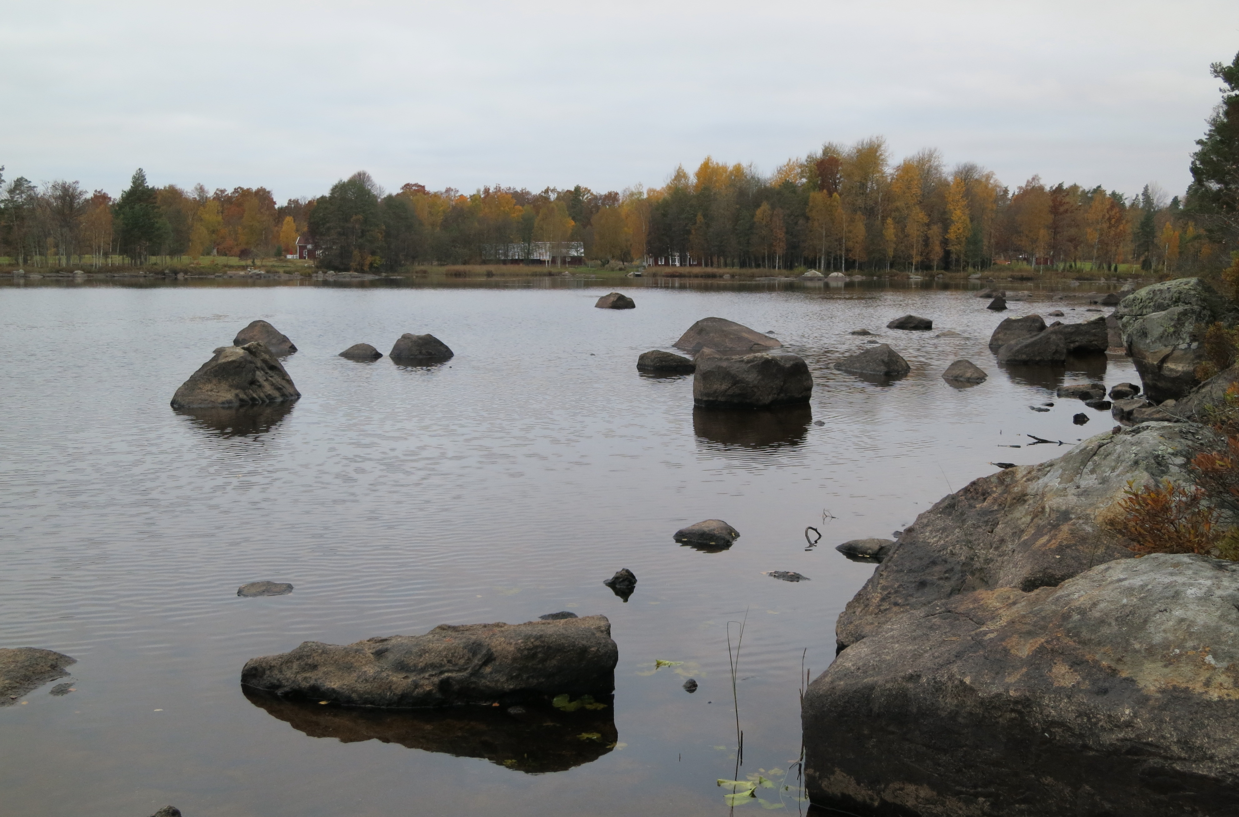 Sjön Törn, Emmaboda kommun